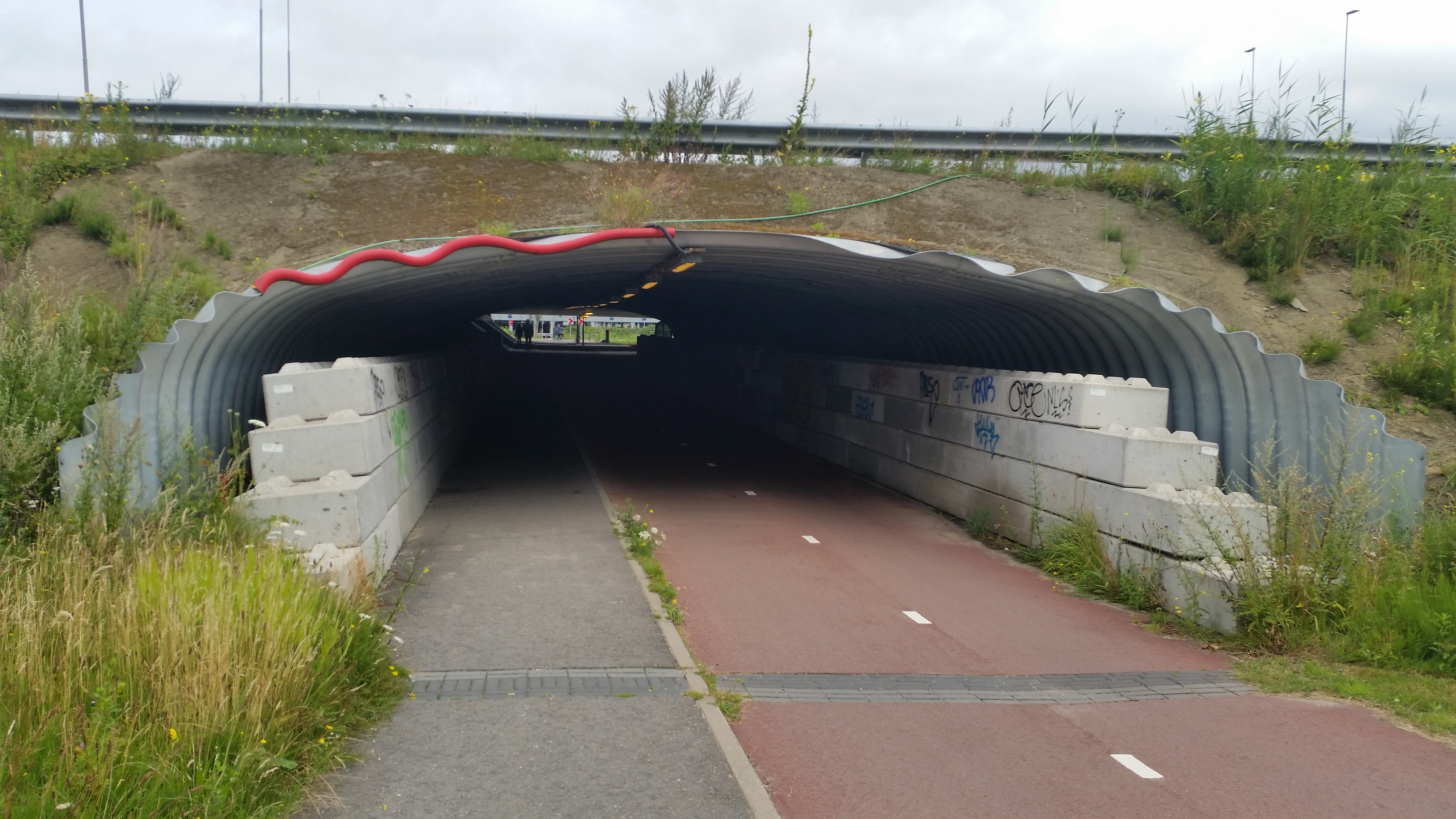 Noodtunnel Haarlerbergpadbrug